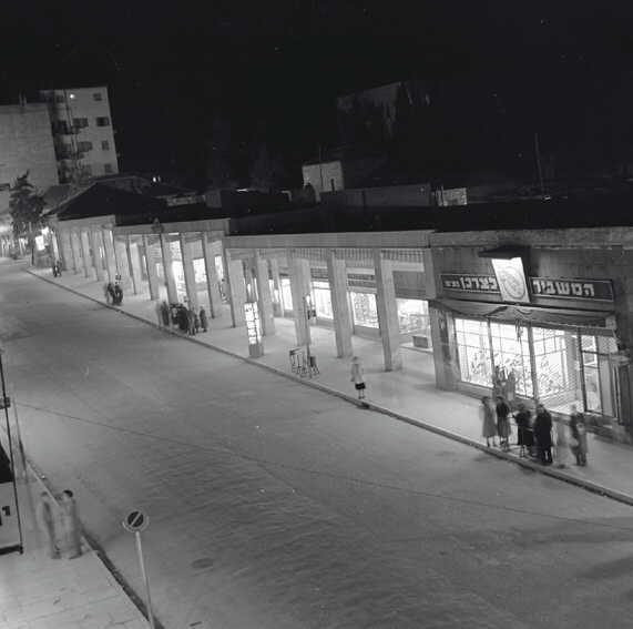 רחוב יפו בירושלים (צילום לילה)